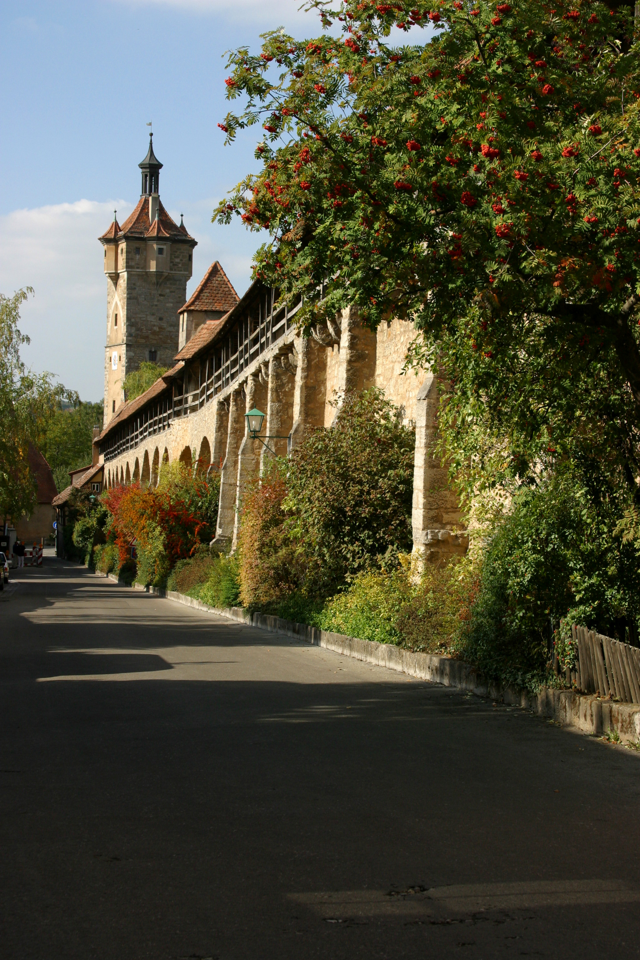 Picture from Rothenburg ob der Tauber